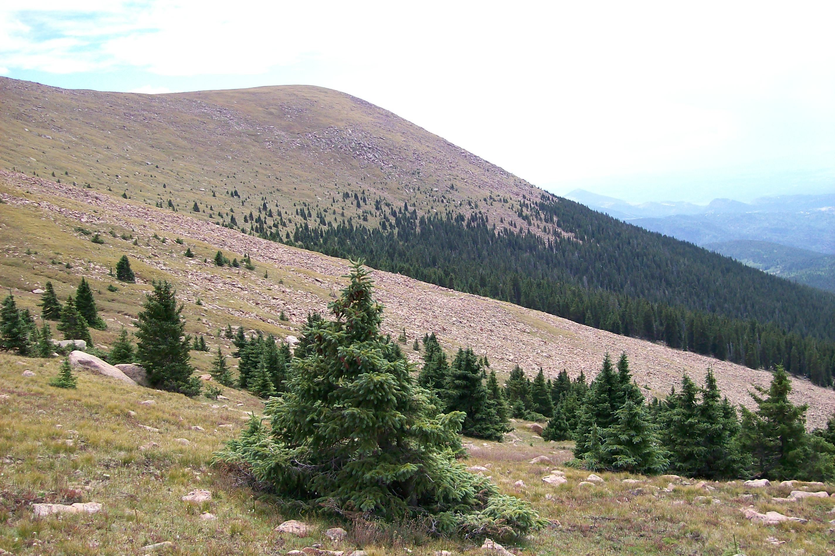 Picea engelmannii at tree line, Pikes Peak, Colorado.